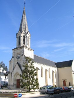 Eglise de Mettray